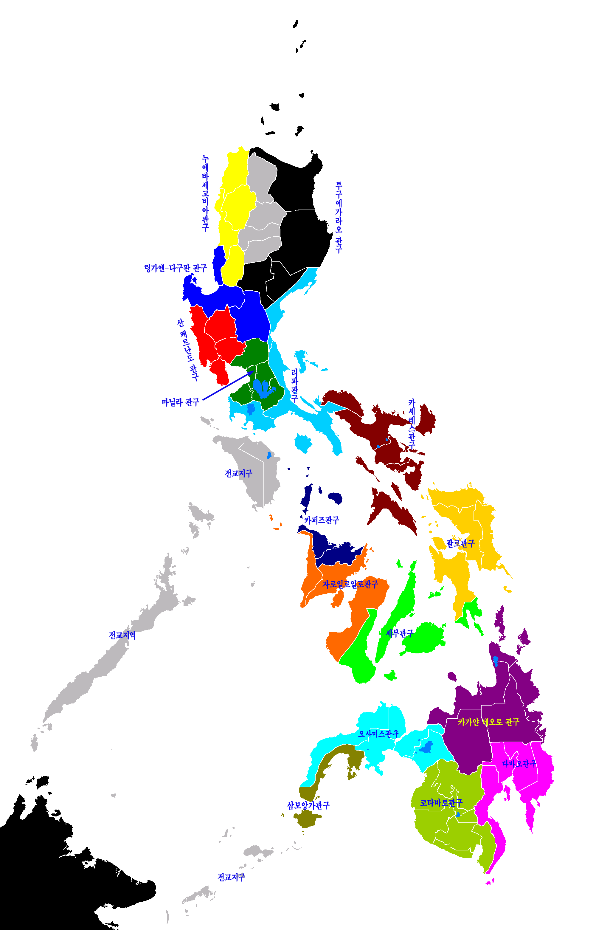 필리핀 가톨릭관구도